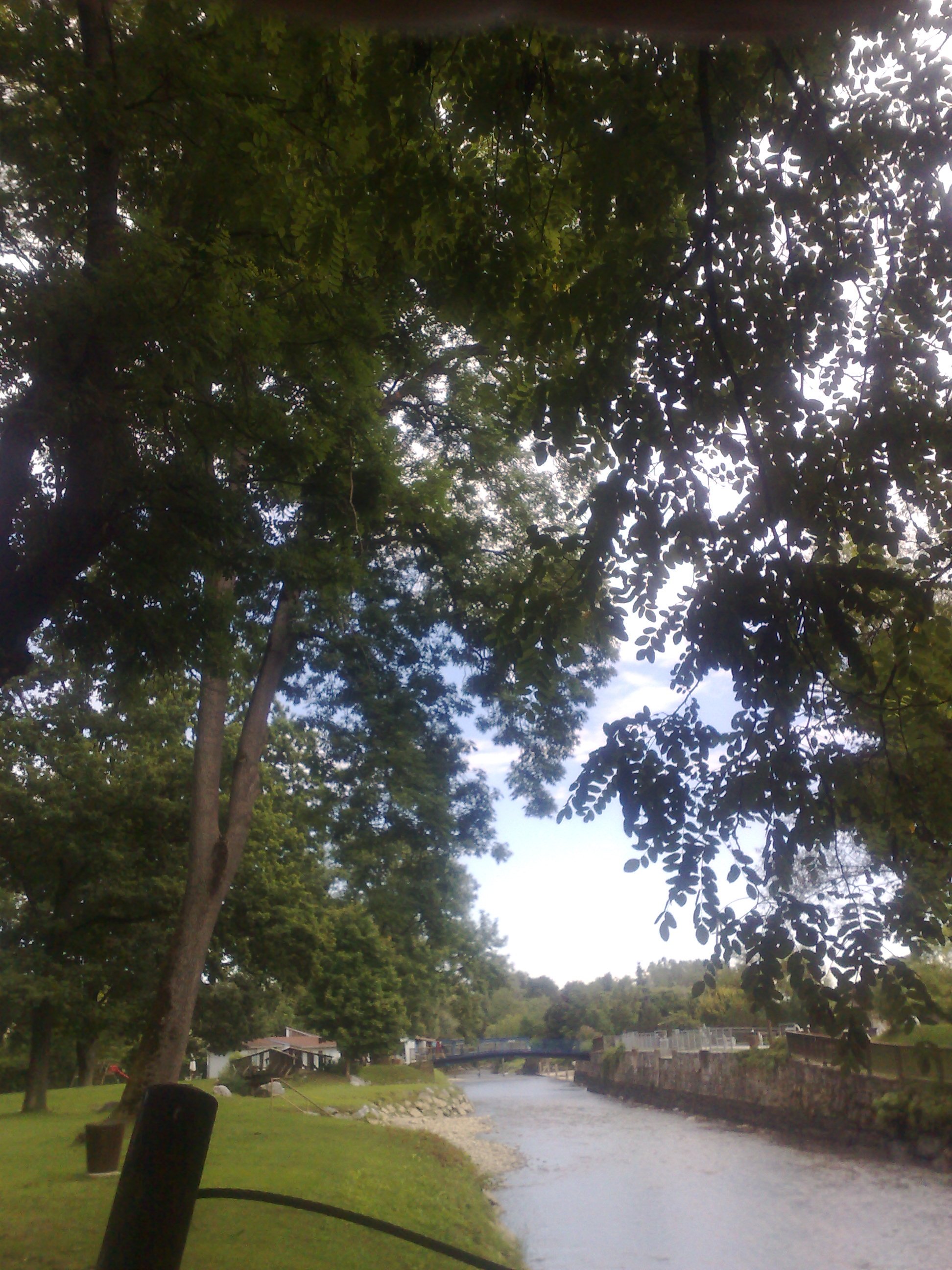 Sankt Ruprecht an der Raab - Rába-parti strand